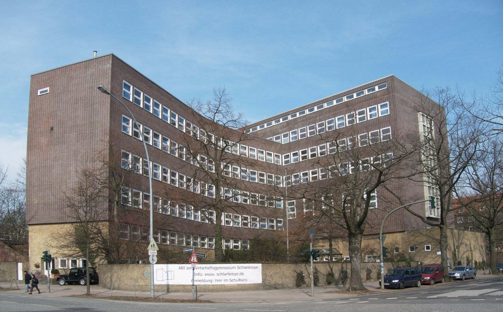 Wirtschaftsgymnasium Schlankreye This is a photograph of an architectural monument.